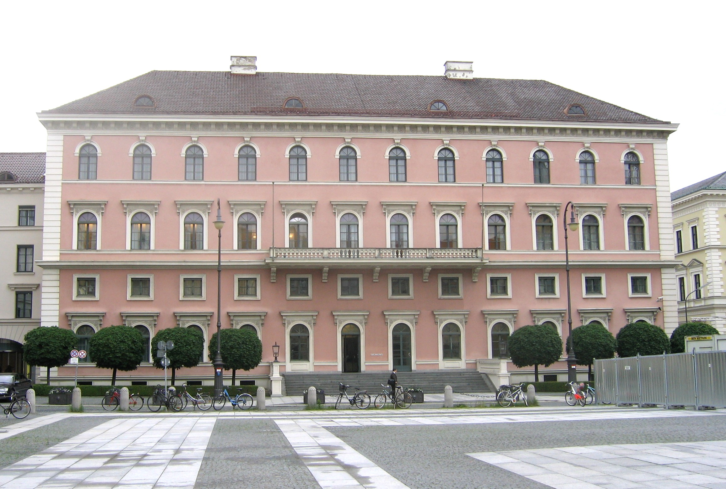 Zentrale der SIEMENS AG am Wittelsbacherplatz